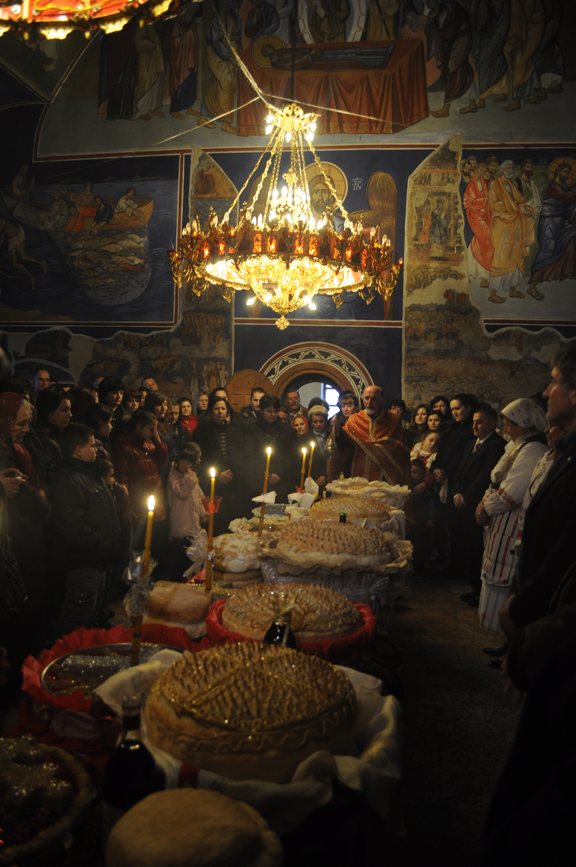 Црковна служба по повод празникот Водици, во селото Драслајца, Струга